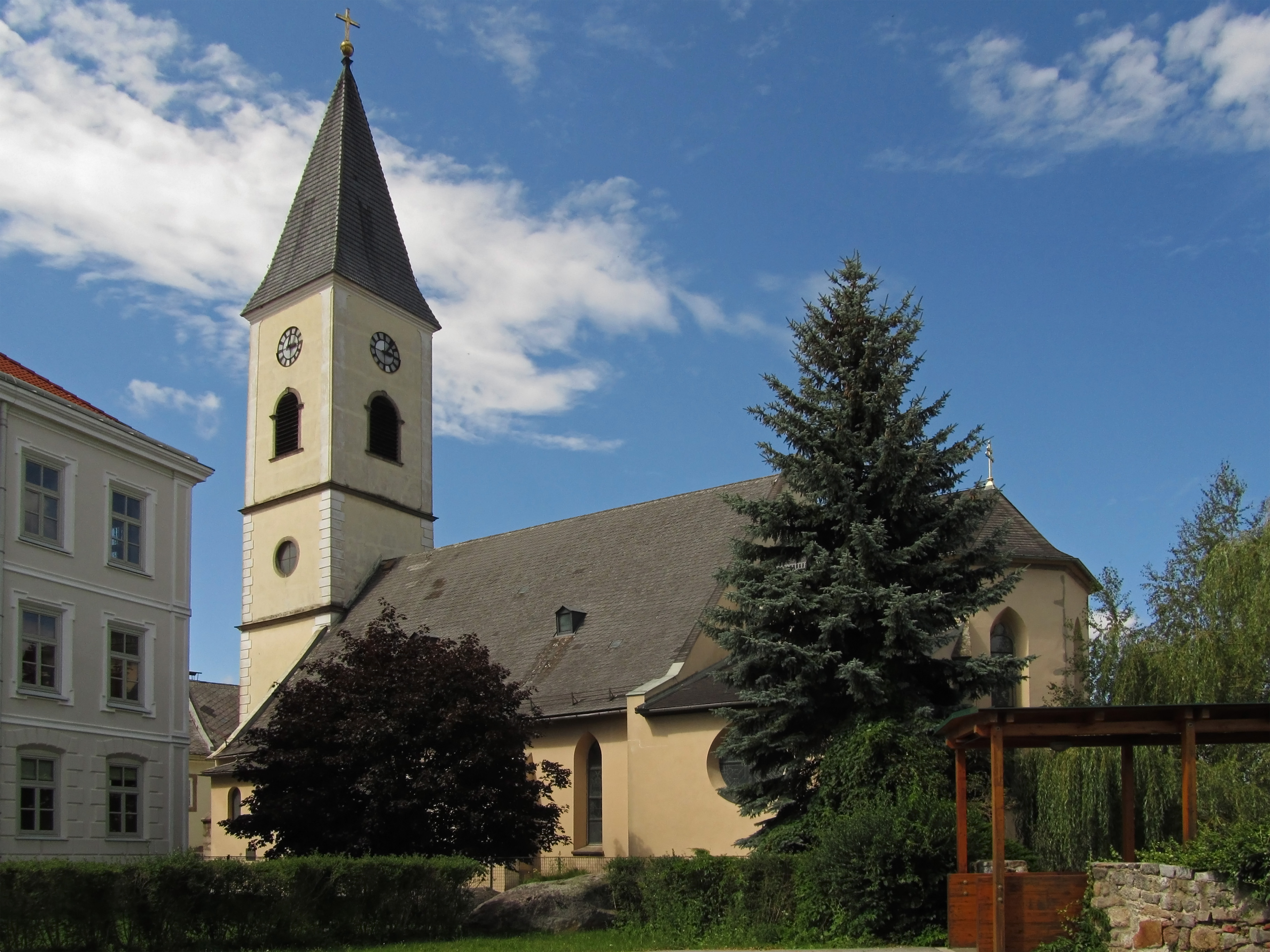 Die ursprünglich romanische Kirche wurde im 13. und 15. Jahrhundert ausgebaut. Der heutige Kirchturm wurde von 1852 bis 1854 errichtet. Der Chor wurde 1981/1982 nach Plänen des Architekten Clemens Holzmeister erweitert. Die Kirche besitzt eine neugotische Einrichtung.